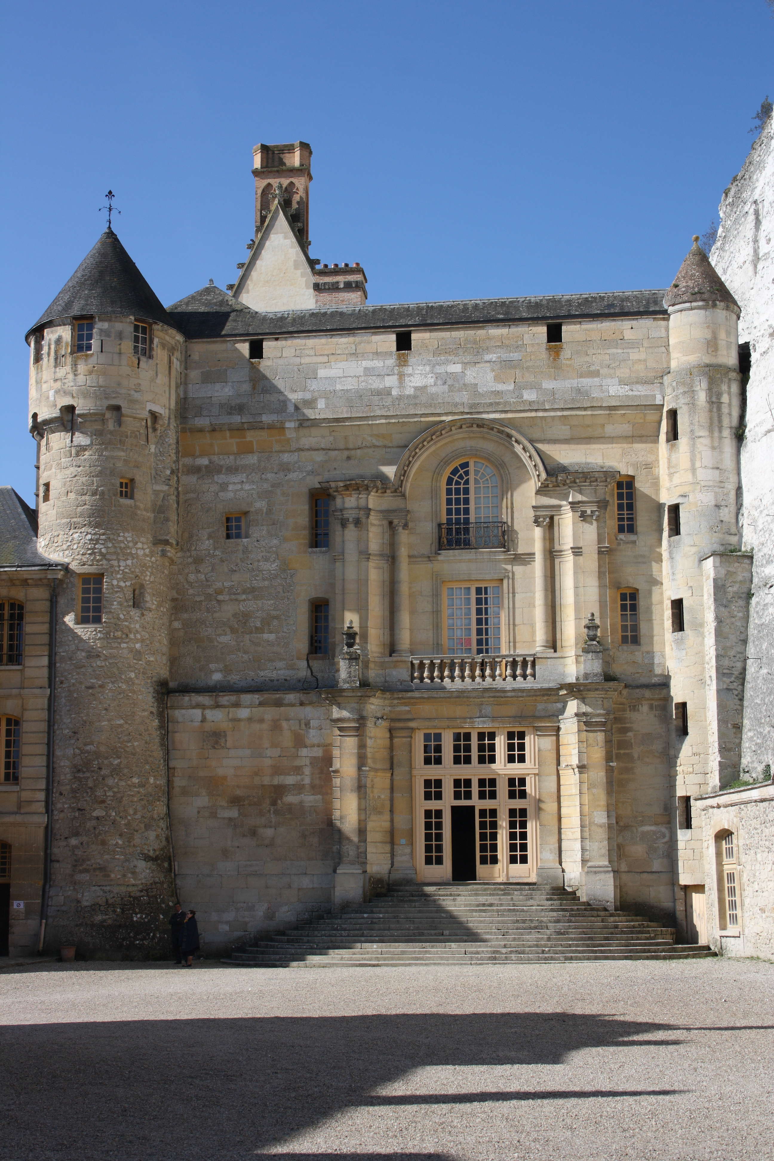 Schloss in La Roche-Guyon